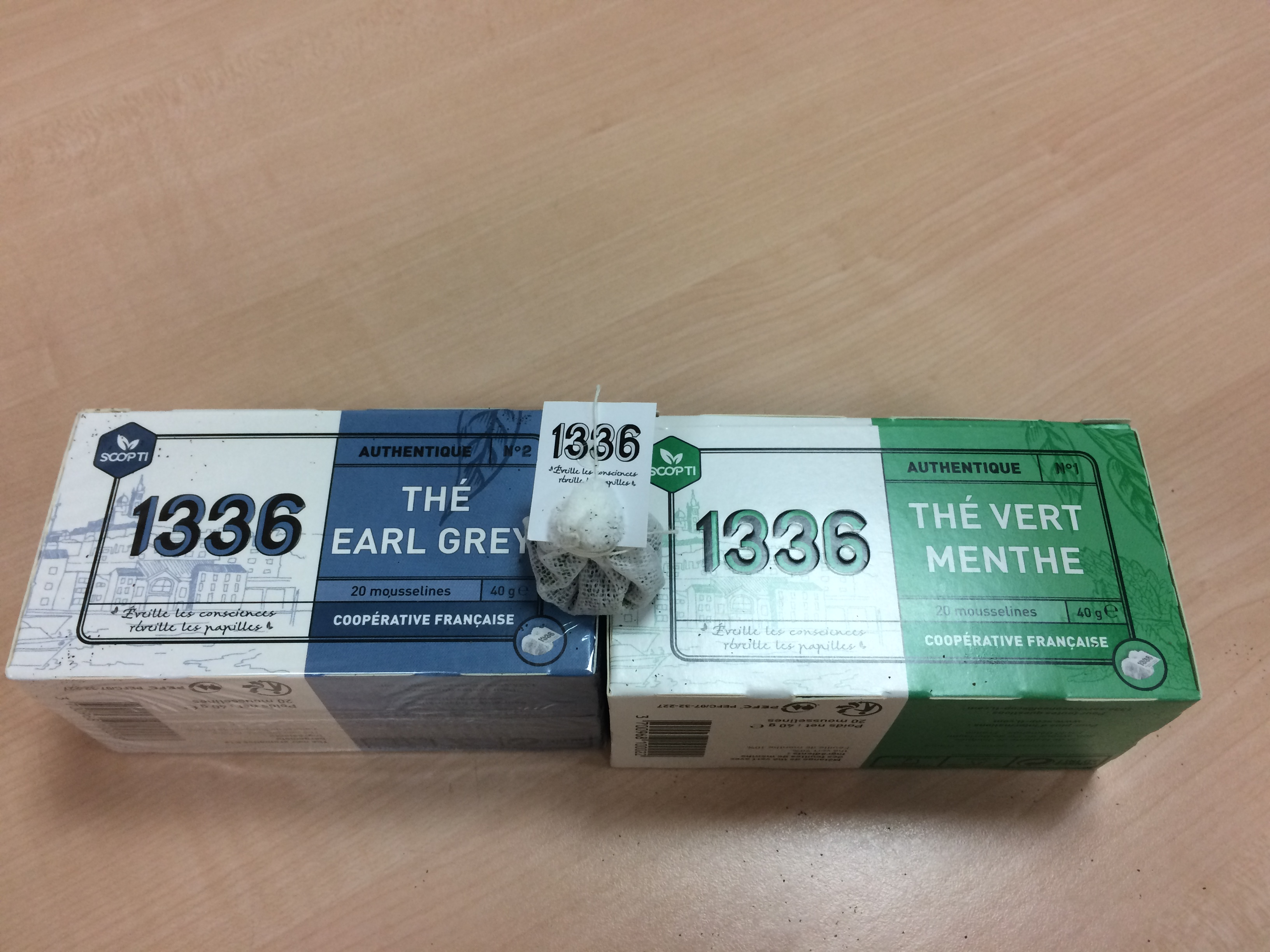 Boites de thé et sachets de thé "1336" de la société française SCOP-TI